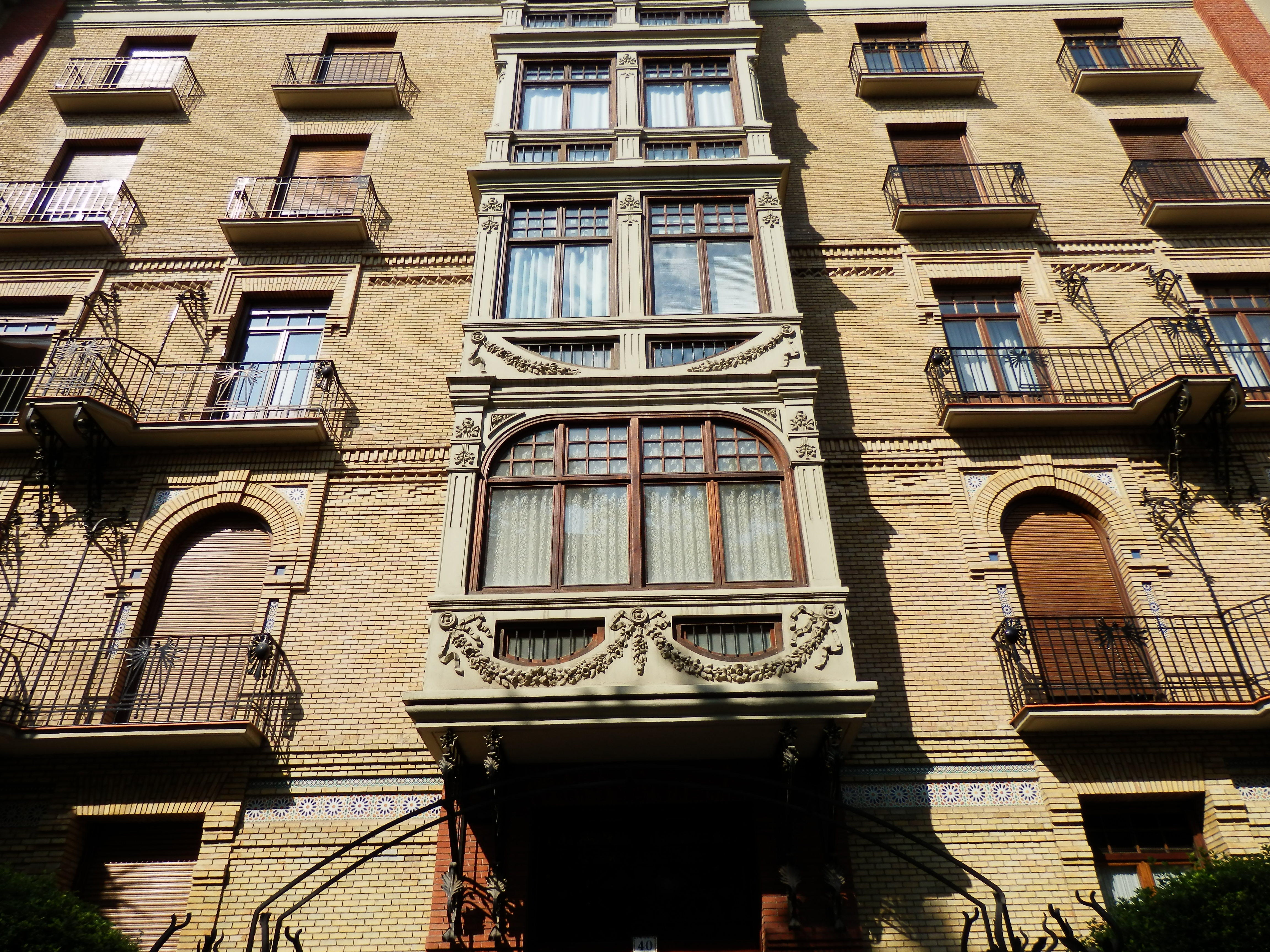 Edificio de viviendas situado en el Paseo de Sagasta, 40, de Zaragoza, España. Es bien de interés cultural (BIC) de la provincia de Zaragoza.